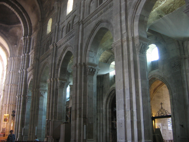 Cathédrale d'Autun, France. Nef.